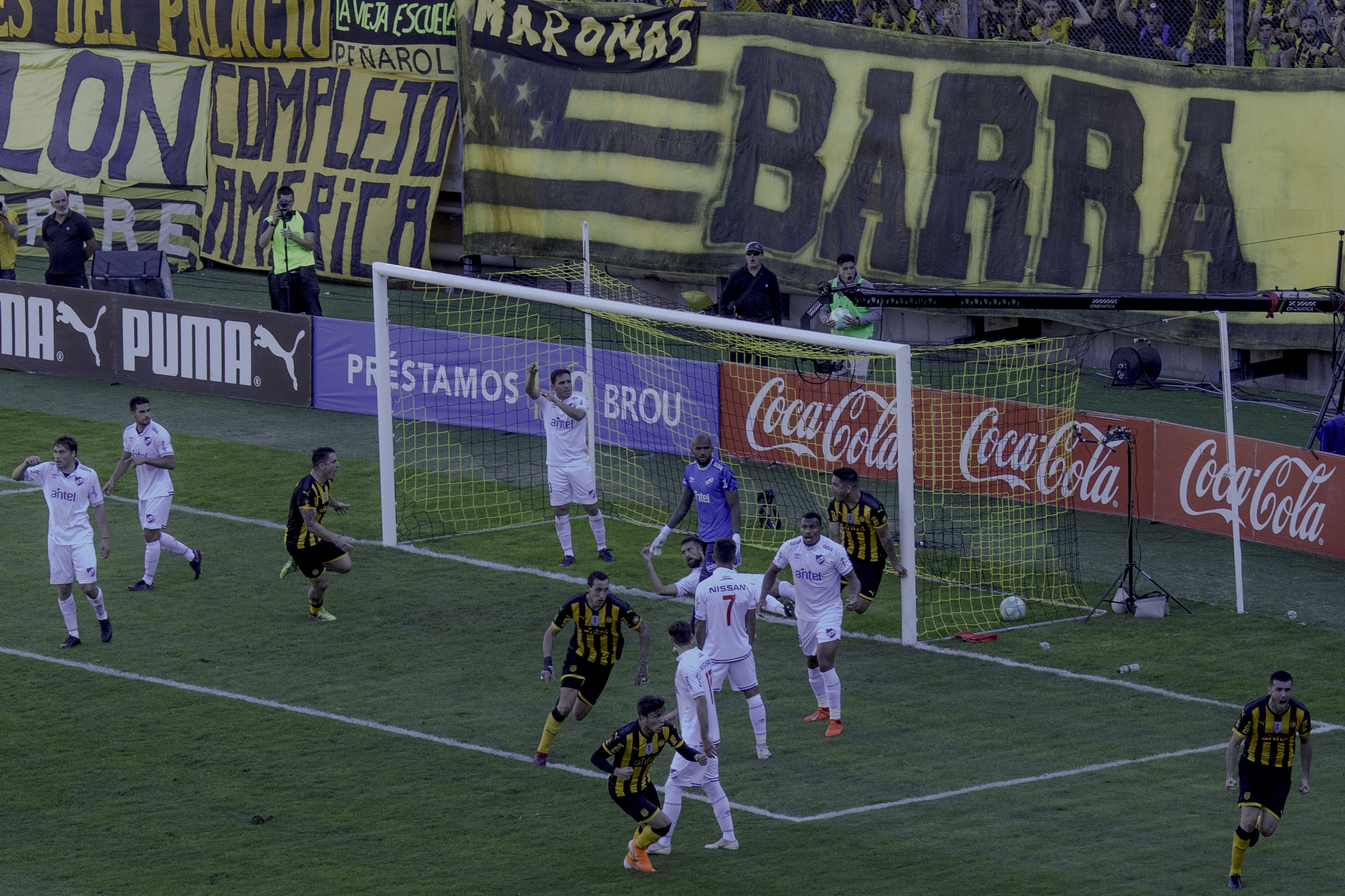 Peñarol y Nacional empataron 1-1 en el Estadio Campeón del Siglo por la fecha 12 del Torneo Apertura 2019 (Uruguay). Montevideo, 12 mayo 2019.